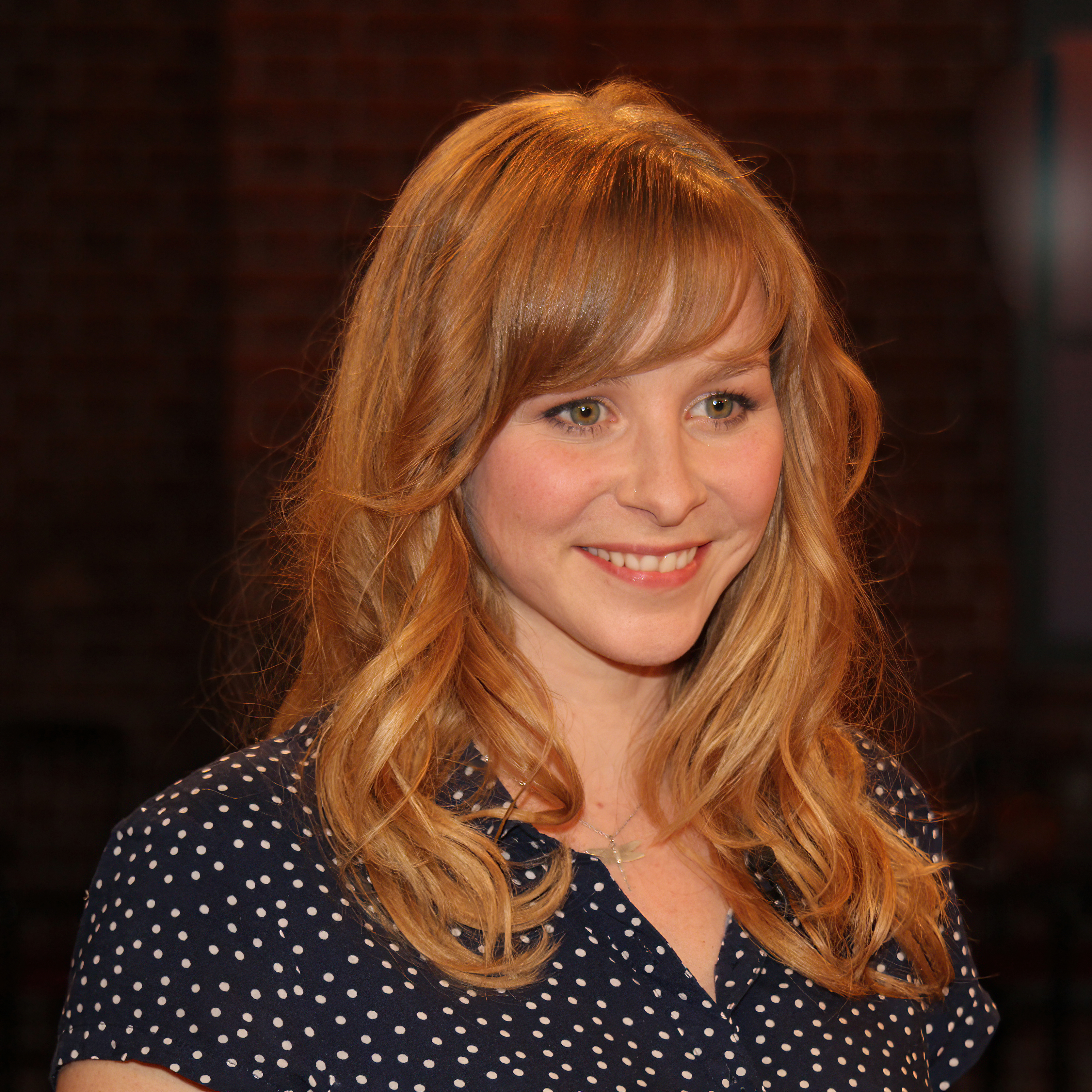 Foto nach der Aufzeichnung des Kölner Treffs, eine Fernsehsendung des Westdeutschen Rundfunks